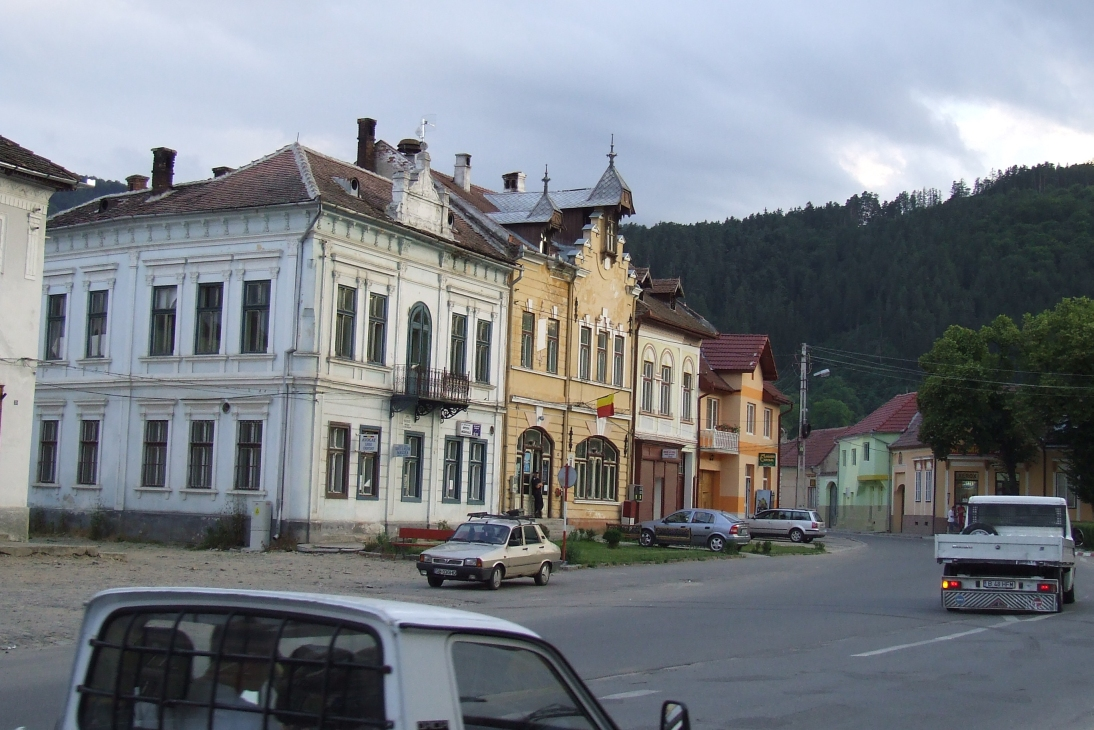 Ansamblul rural "Centrul istoric" sec. XVIII - XIX